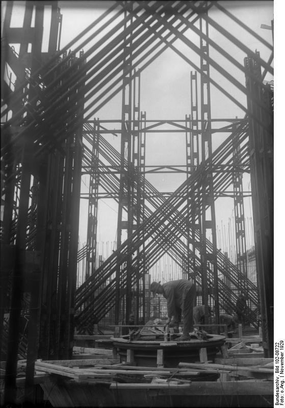 Die Symphonie der Arbeit! Eine interssante Aufnahme der Riesen-Eisenkonstruktionen für den Bau der Schleusenzellen des Mittellandkanals bei Hannover.